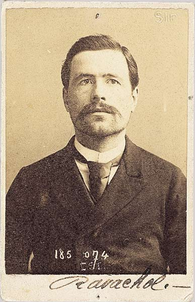 Photographie de Ravachol, tirage sur papier albuminé d'après négatif sur verre au collodion